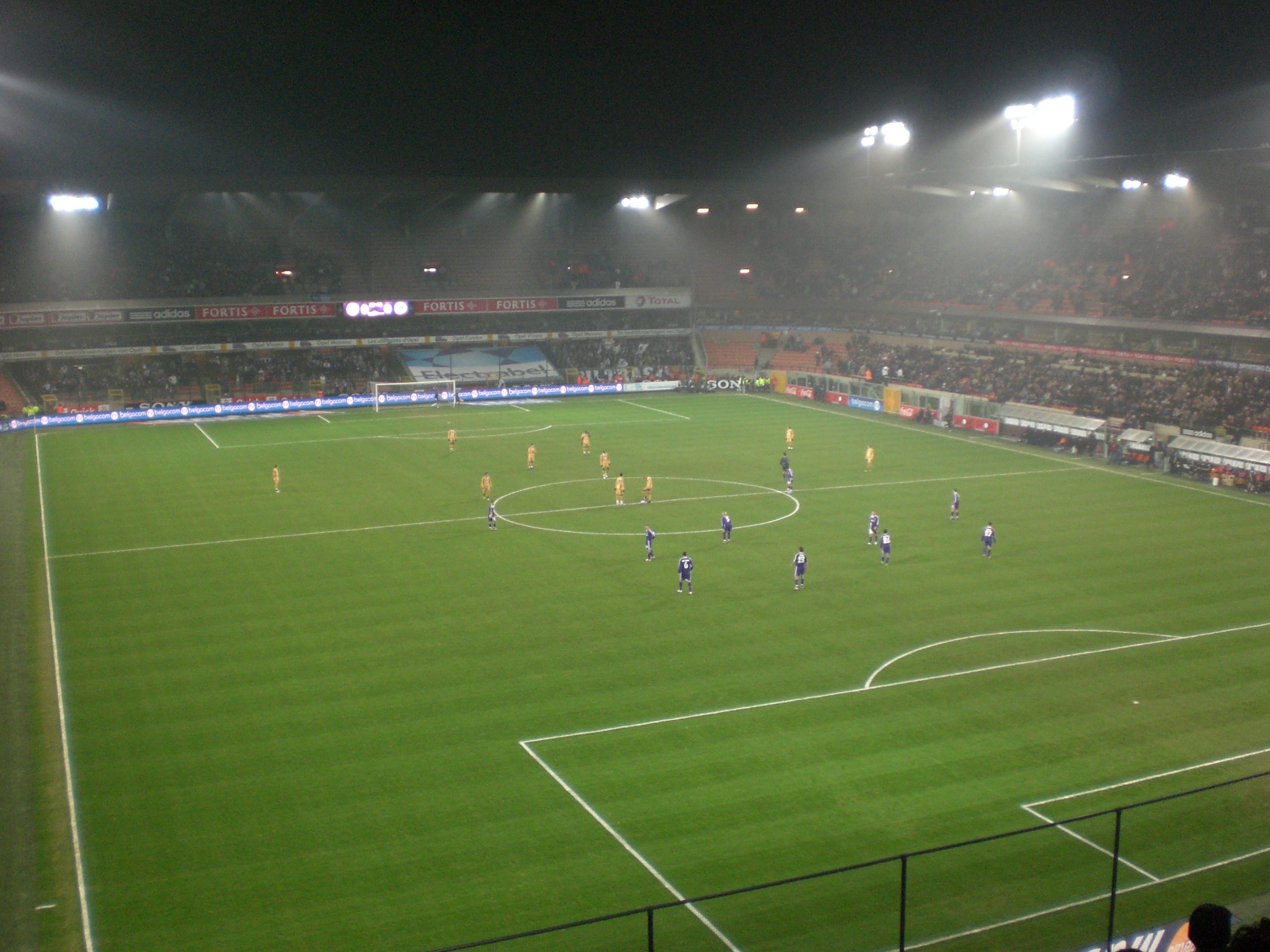 Coup d'envoi de RSC Anderlecht - FC Girondins de Bordeaux(2-1), en 1/16ème de finale de Coupe UEFA, le 13/02/08.